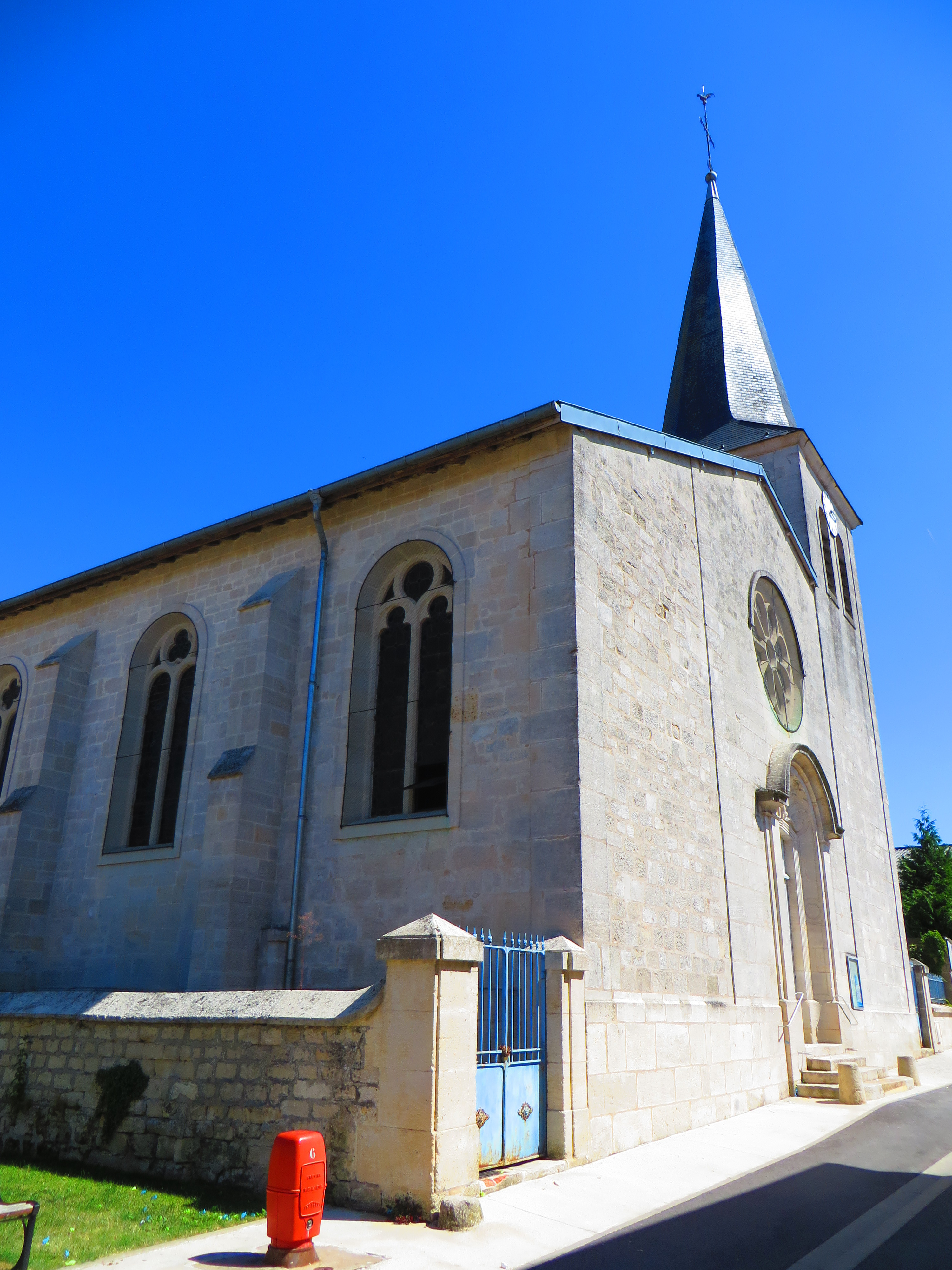 Haudainville L'église Saint-Symphorien